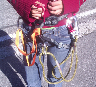 Material necesario para realizar una vía ferrata Enlace con la página del autor Vías ferratas en español- Imágenes e información de vías ferratas en Espana, Francia y Andorra